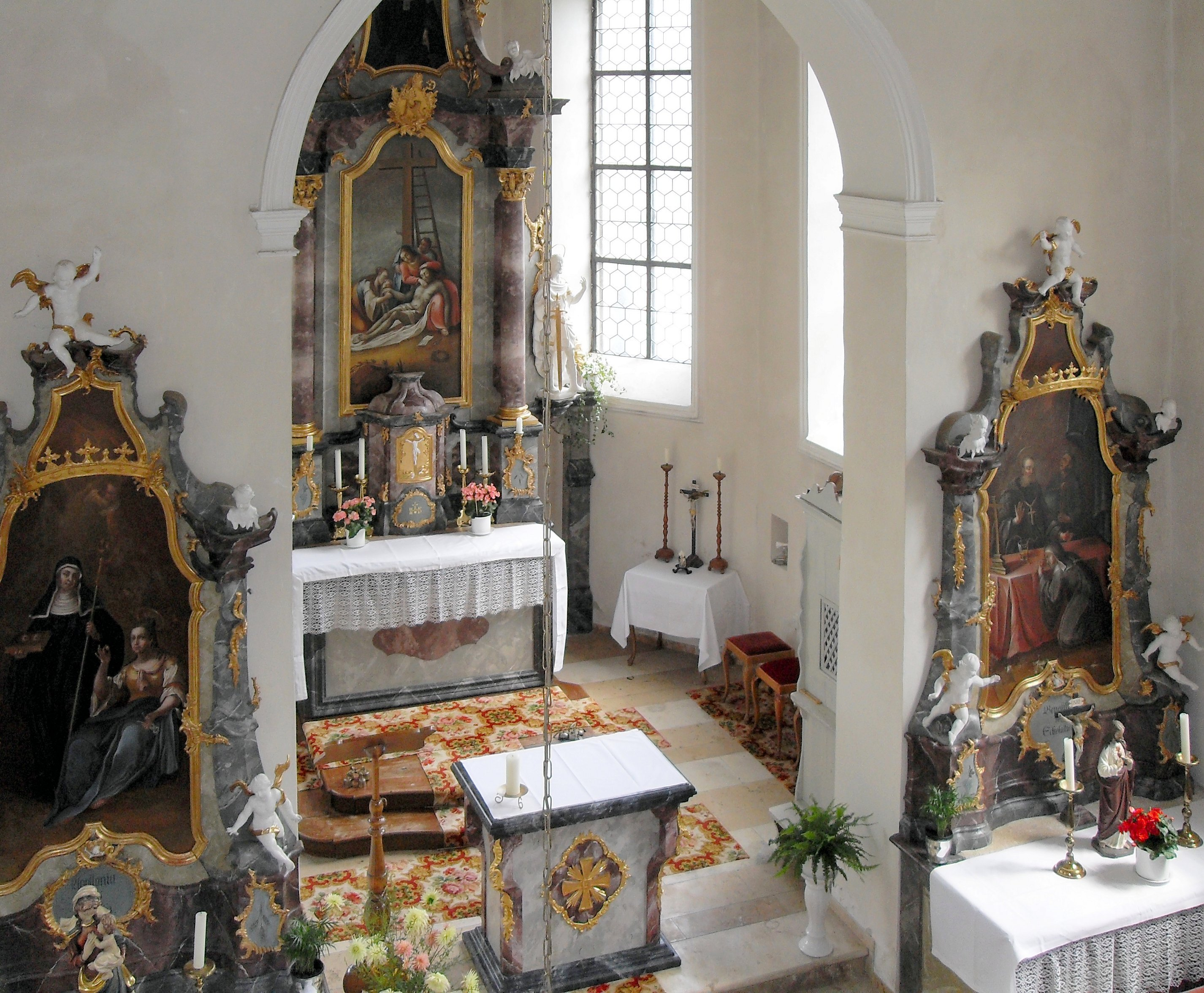 Innenansicht der St.-Felix- und Nabor-Kapelle in Schmidhofen, Stadt Bad Krozingen, Baden-Württemberg